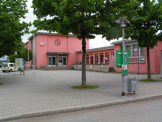 Bahnhof Freilassing, 13 km from Bad Reichenhall, Deutschland (Zone 33).